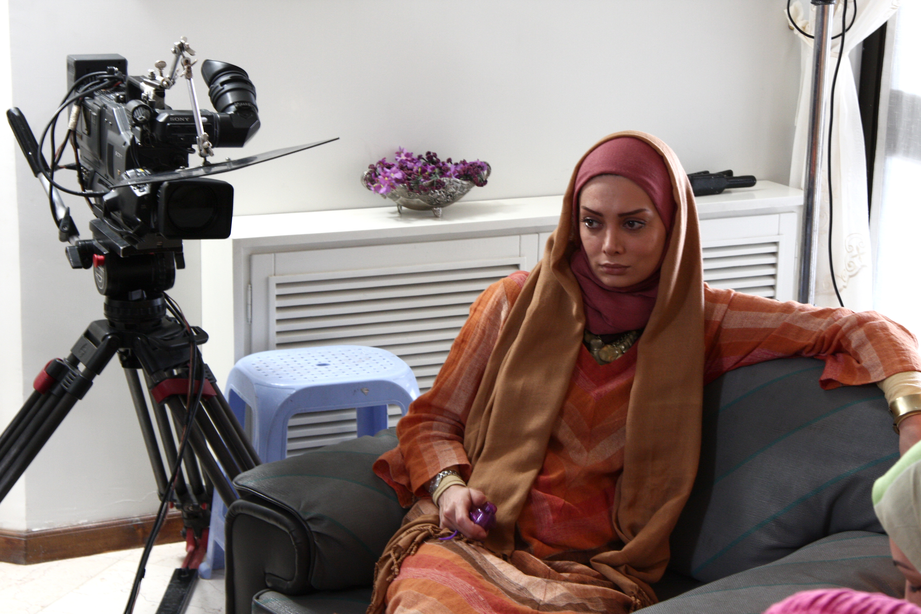 نگار فروزنده. پشت صحنه‌ی تله‌فیلم انتقال